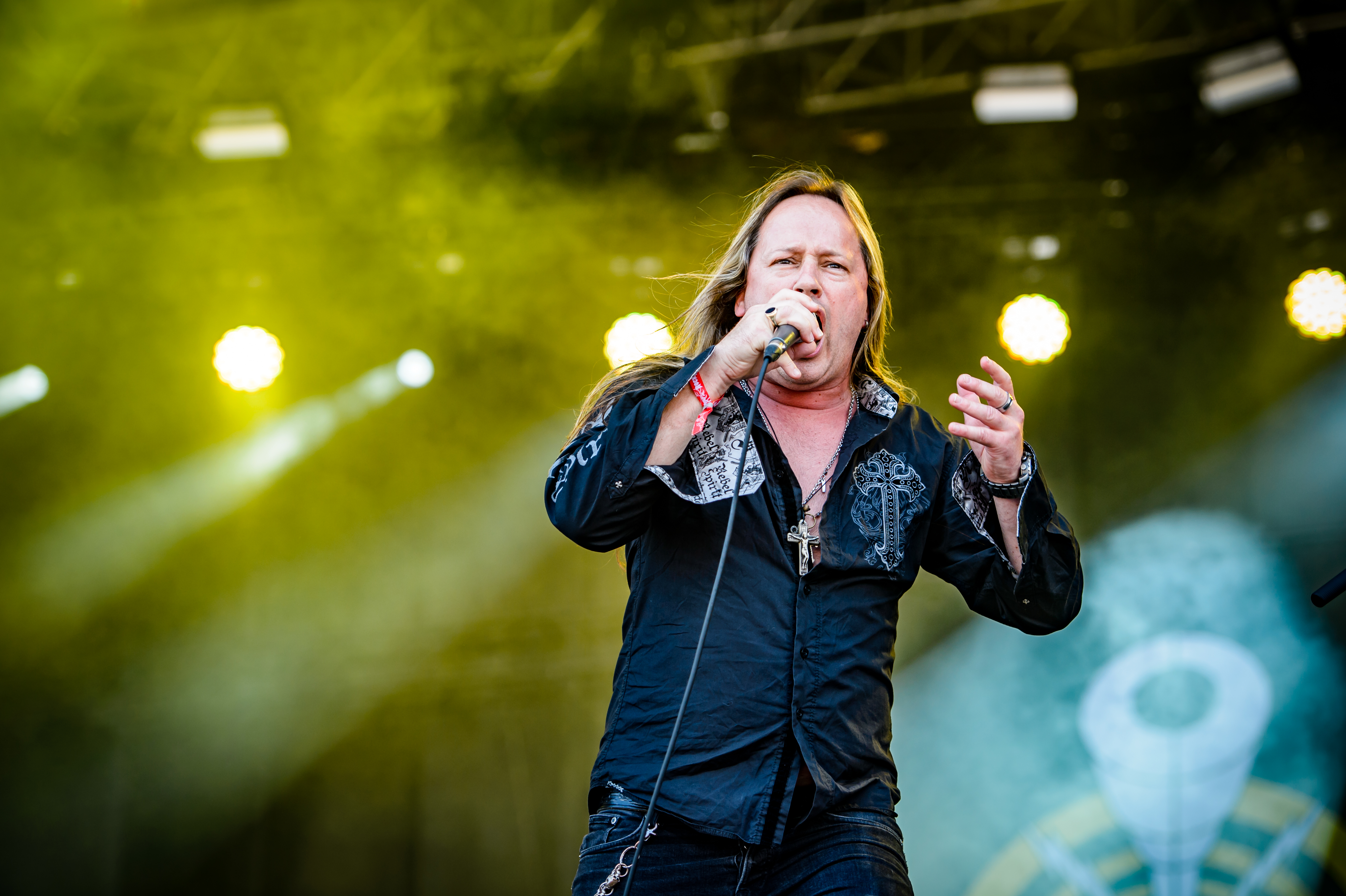 'RockHarz Open Air 2017; Ballenstedt': 'Tank'